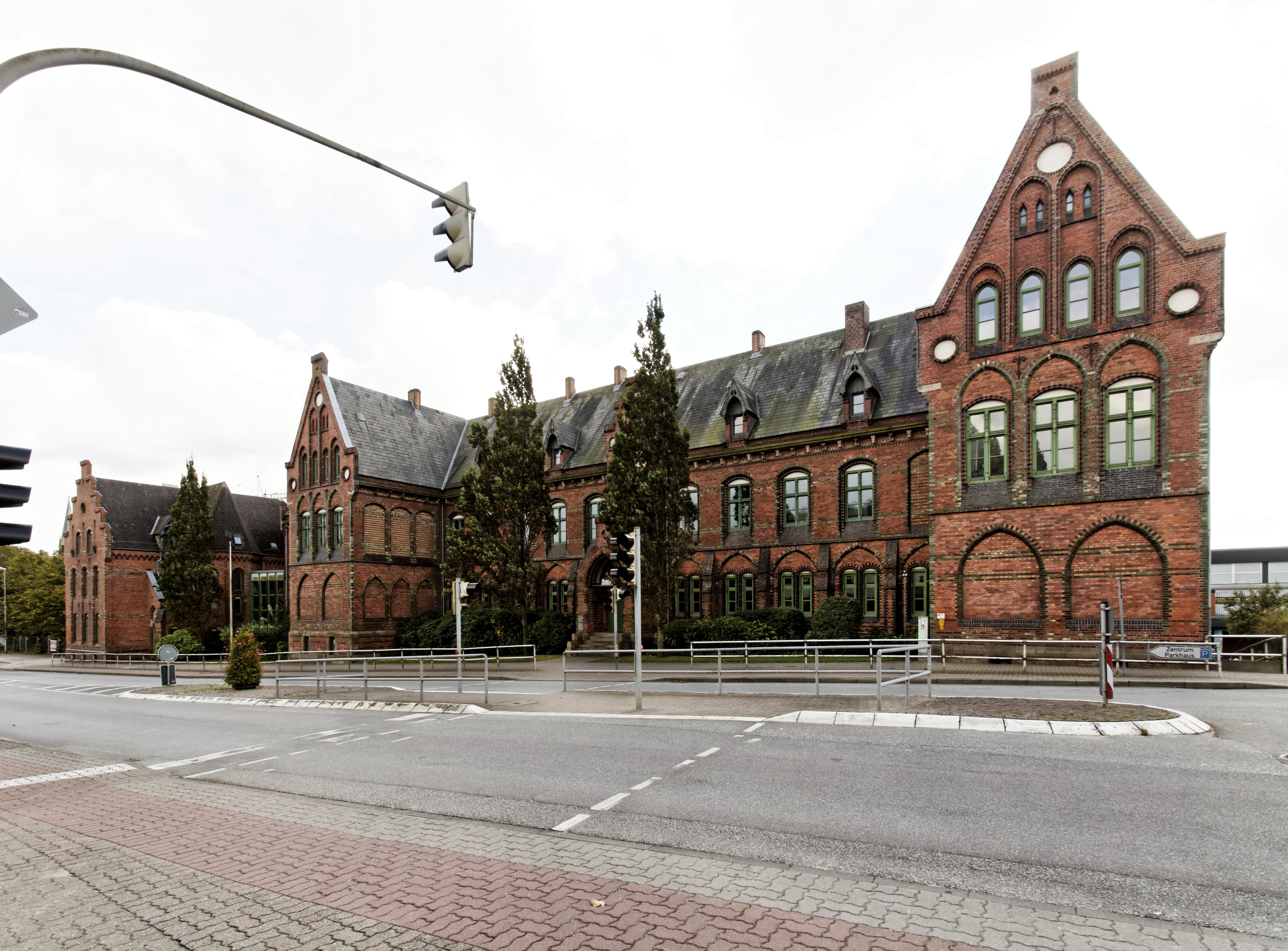 Schleswig, Königstraße 37; Domschule